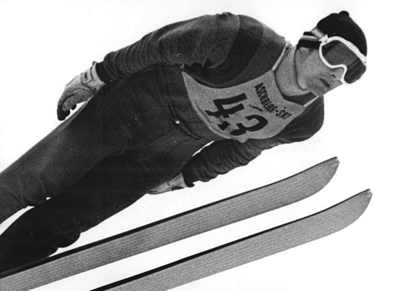 Zentralbild Thieme 20.2.71 Johanngeorgenstadt: XXIII. DDR-Meisterschaften in den nordischen Skidisziplinen Auf der großen Aschbergschanze in Klingenthal wurde der 23jährige Fernstudent an der DHfK Rainer Schmidt (Sc Motor Zella-Mehlis) neuer Titelträger auf der Großschanze. Mit Sprüngen von 93,5 und 94m (Note 222,7) war er eindeutig der beste Springer des Teilnehmerfeldes.